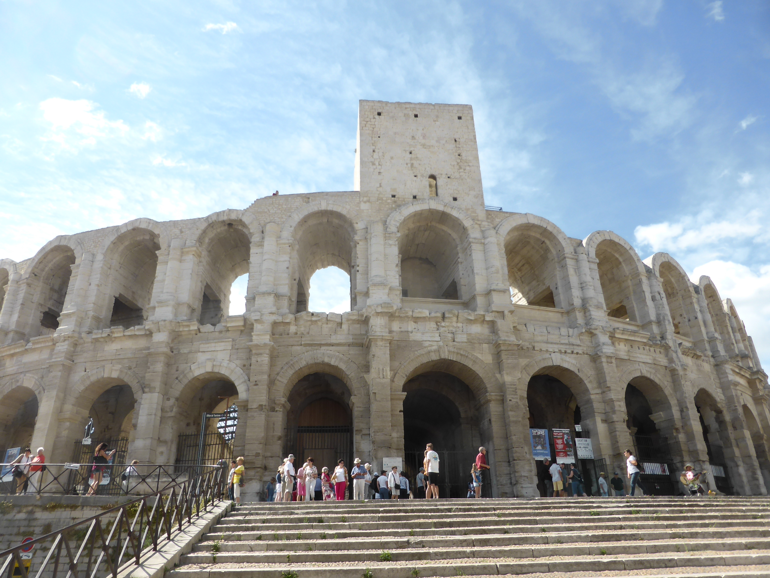 Amphithéâtre d'Arles .